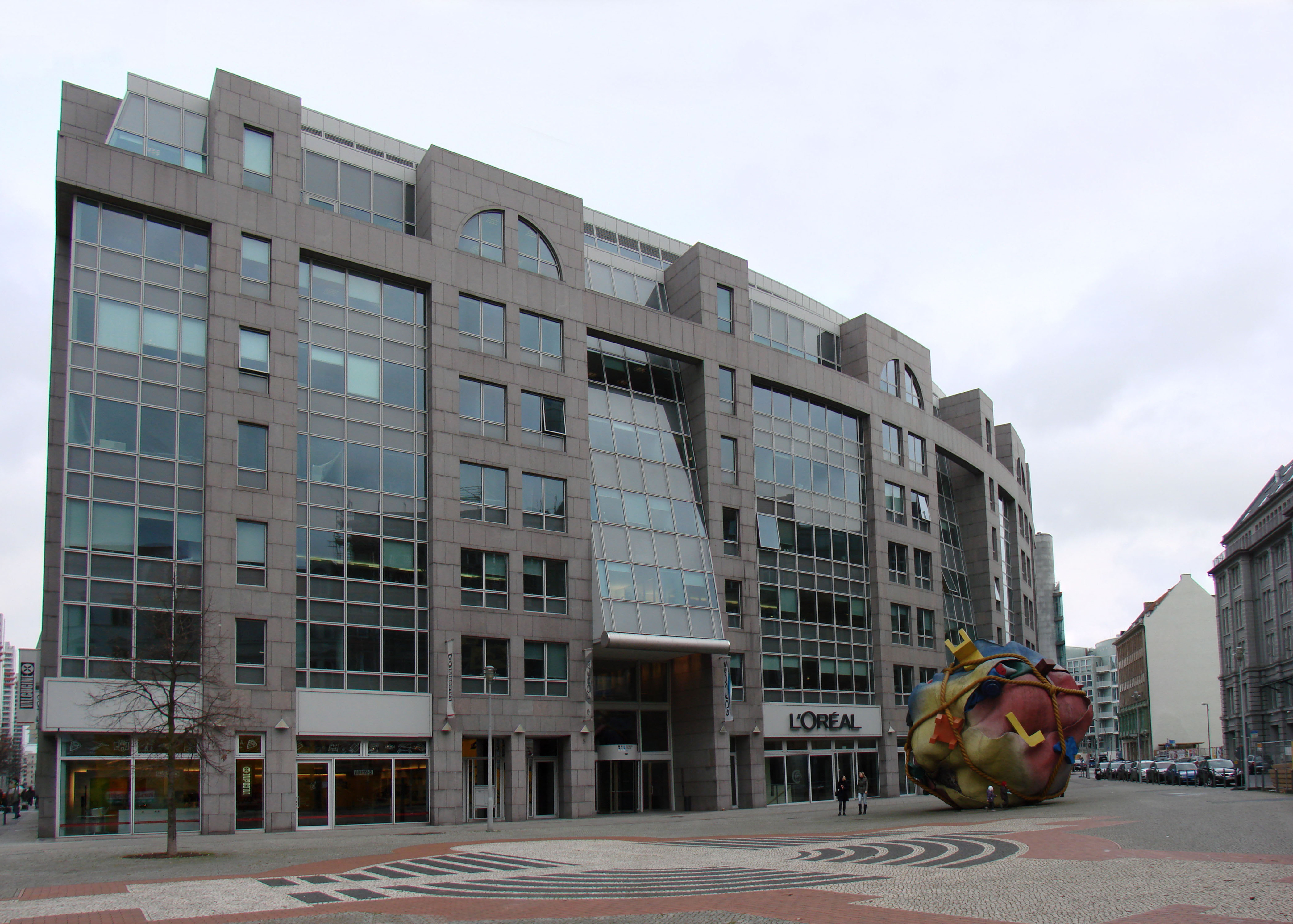 Philip-Johnson-Haus in Berlin Mitte. Stiching aus mehreren Bildern. März 2010